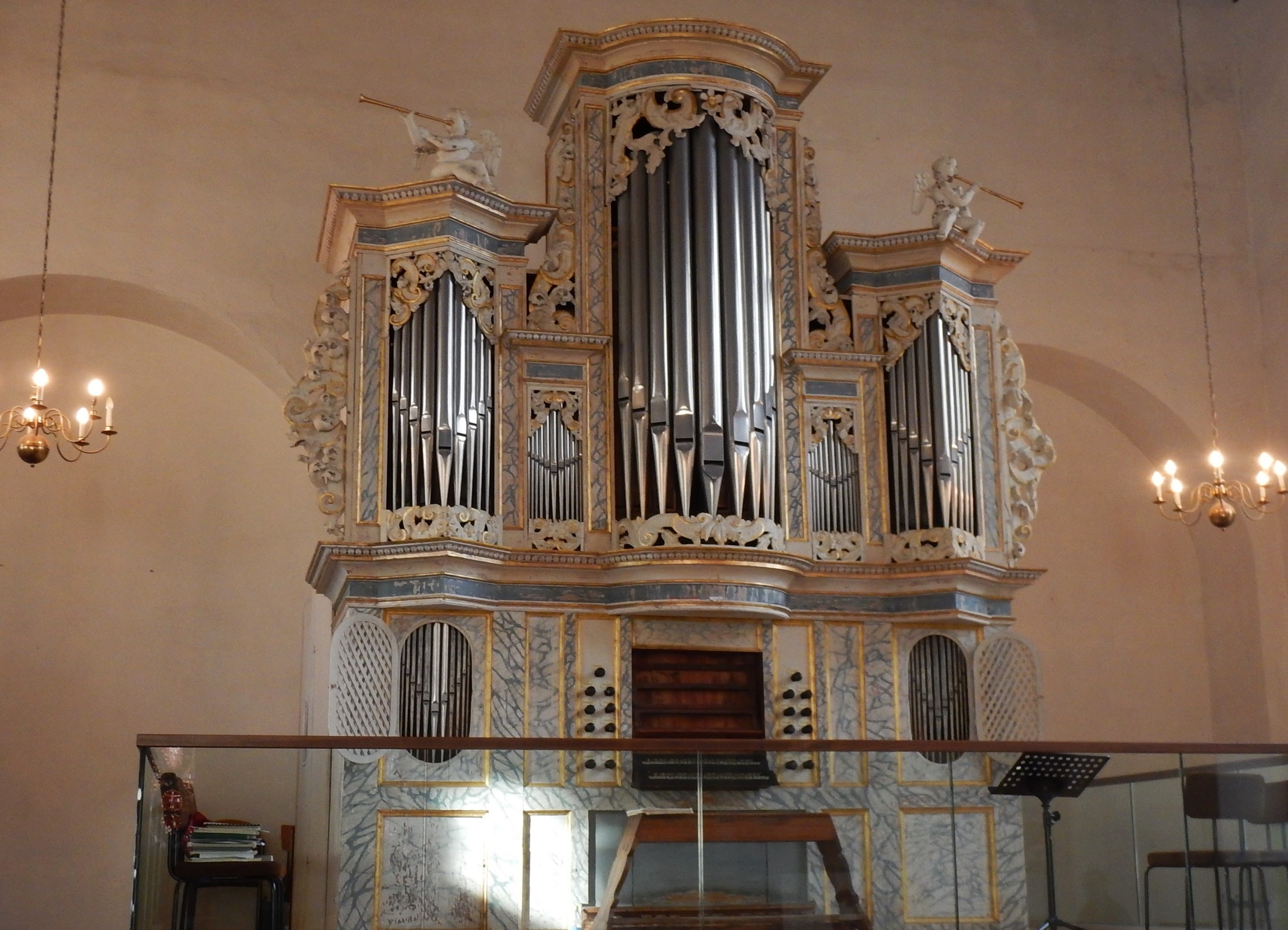 Im Orgelmuseum in der Marienkirche Bad Belzig steht die Orgel von Johann Adolarius Papenius .